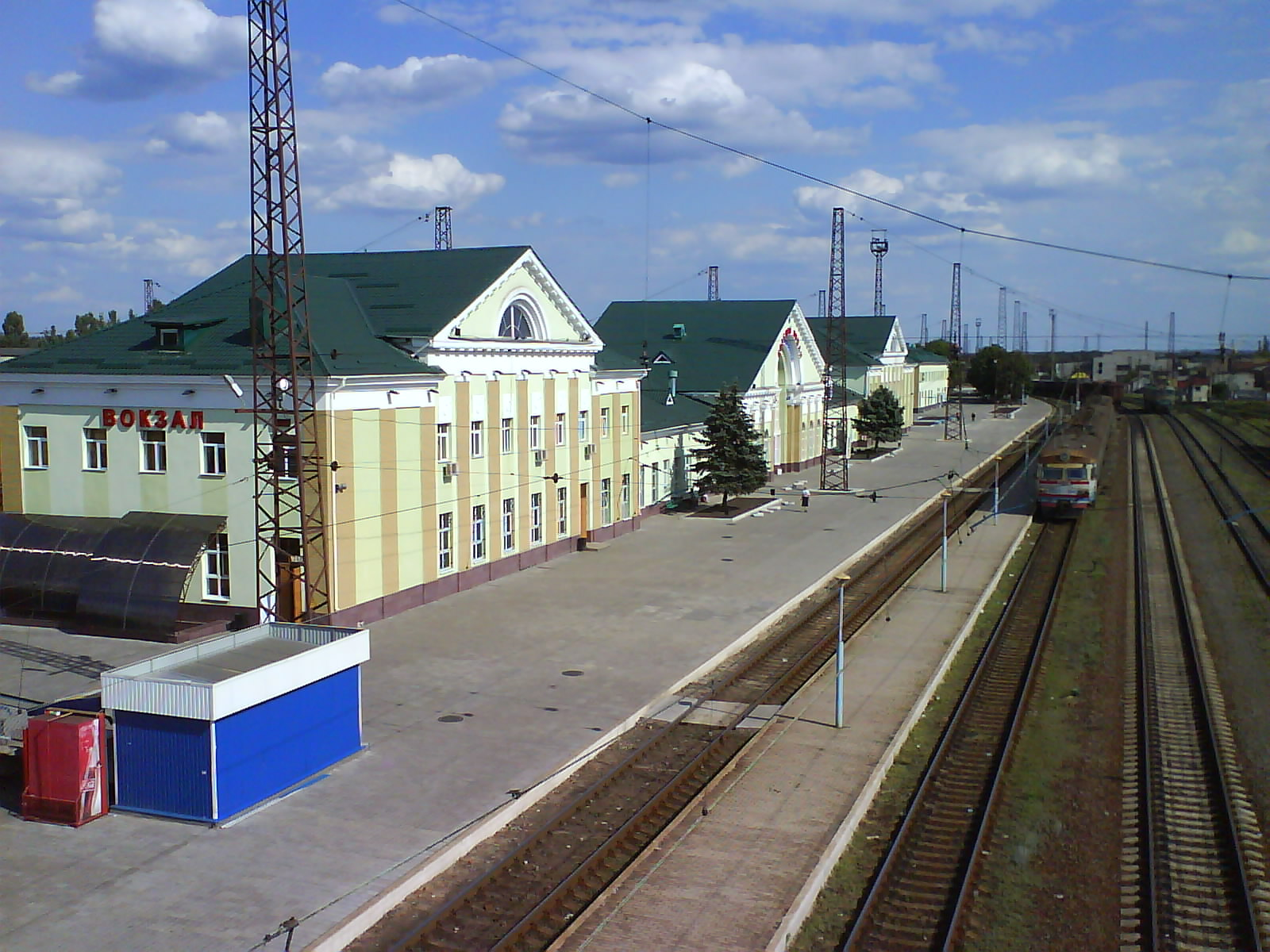 Залізничний вокзал м. Лиман після реставрації.